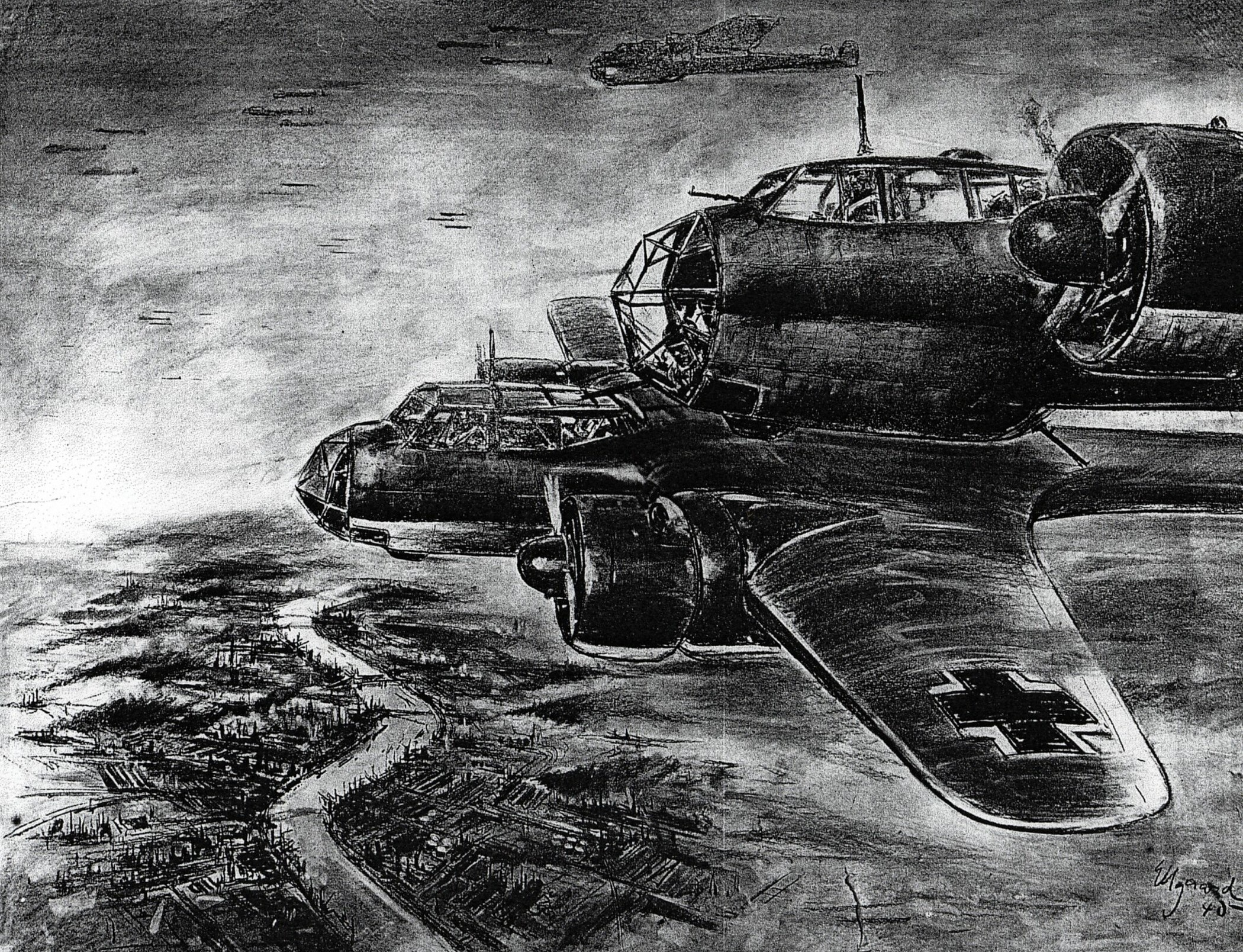 Illustration av krigsreportern Helmuth Ellgaard, "Slaget om England"